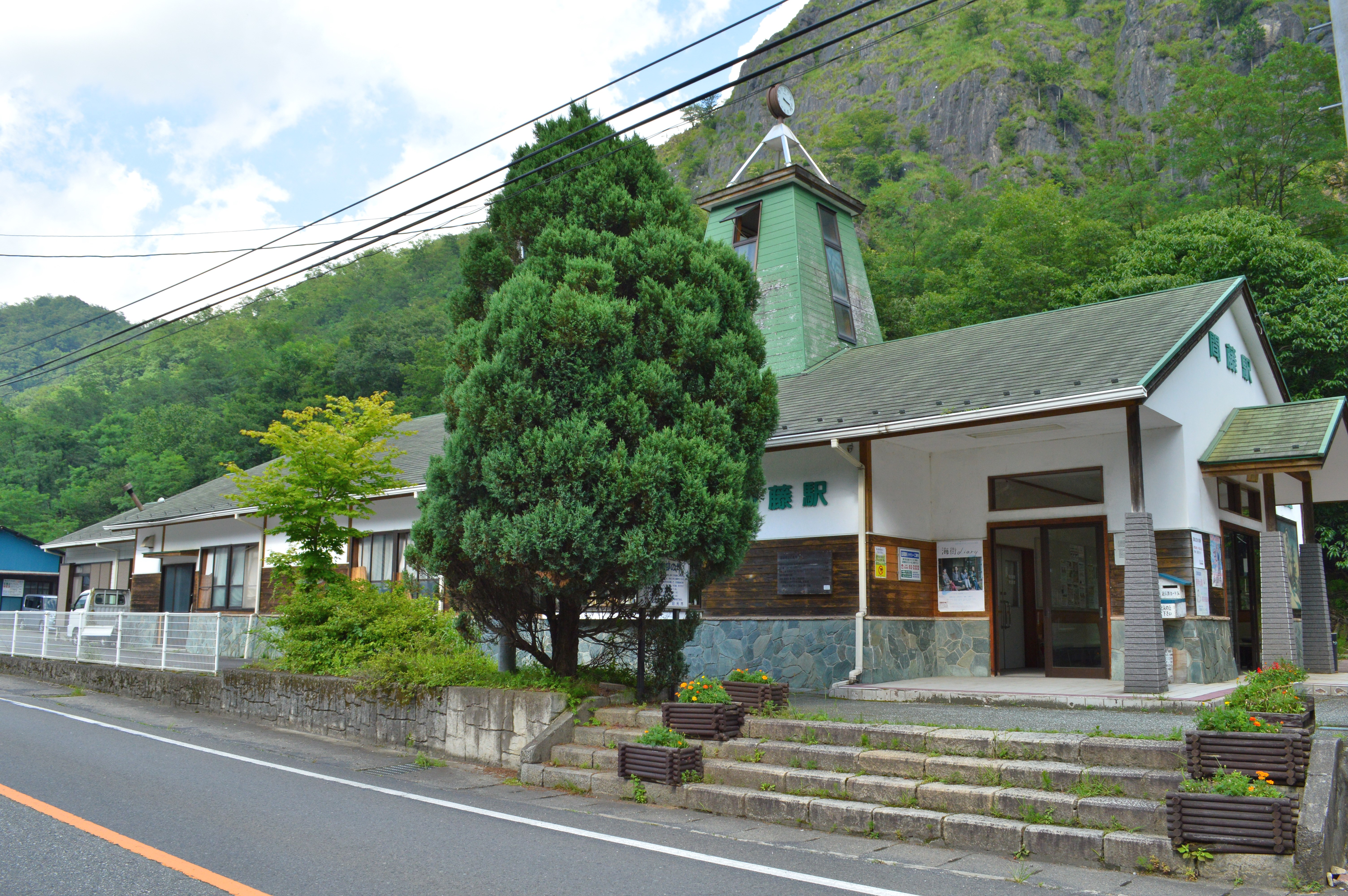 間藤駅 駅舎